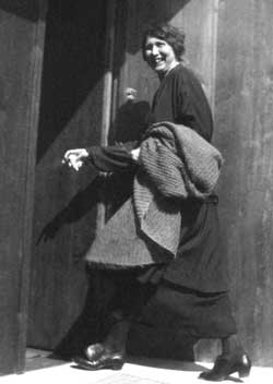 Ita Wegmann am 29.9.1926 vor ihrem Holzhaus Pfeffingerweg 1a, CH-4144 Arlesheim.